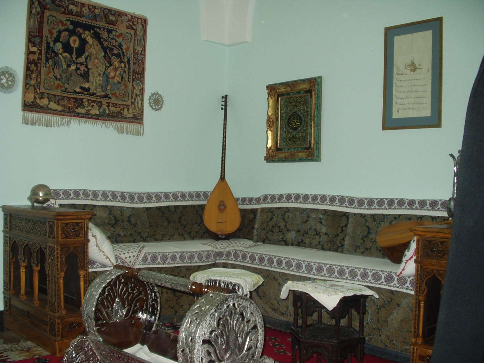 Bosanska soba